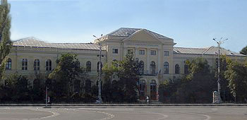 Muséum d'Histoire naturelle "Grigore Antipa" de Bucarest, 1990